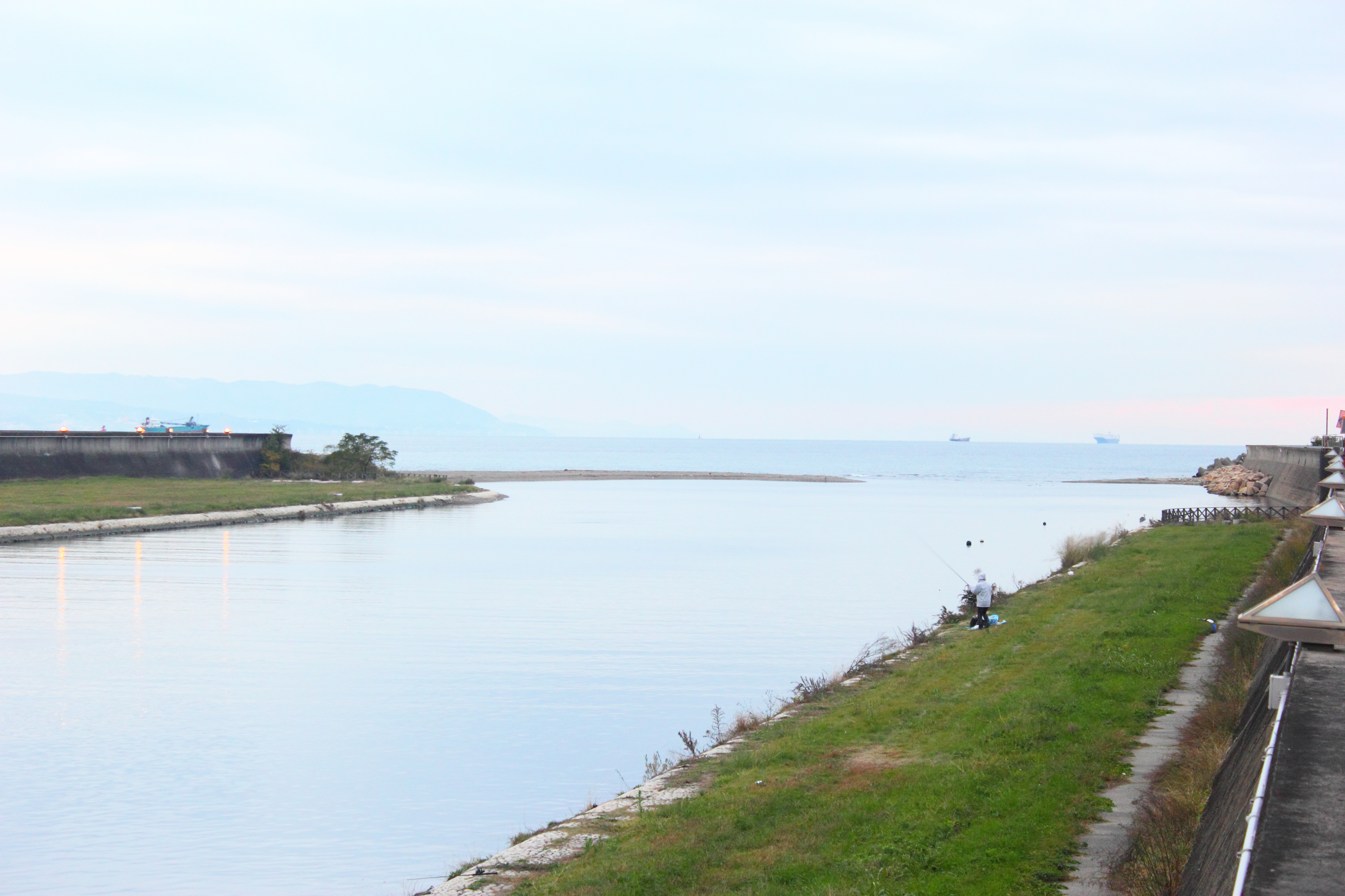 夕暮れの明石川 河口